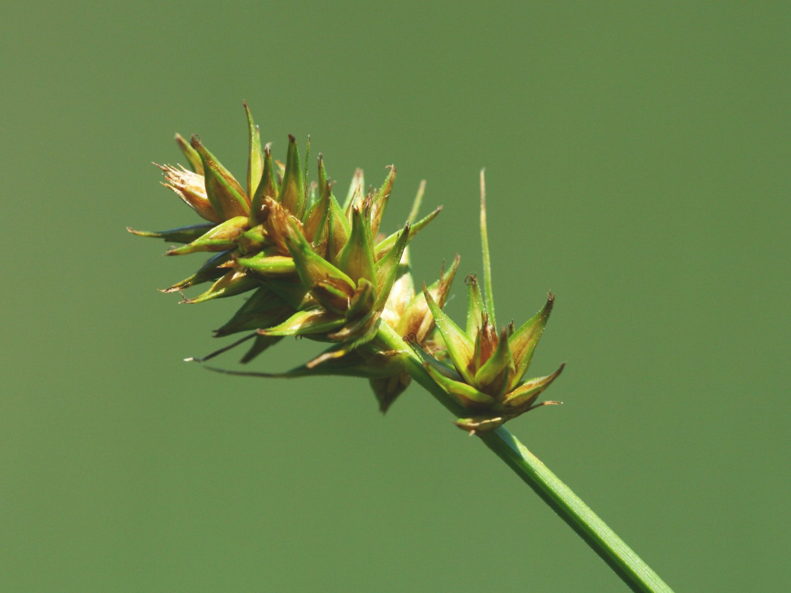 Falsche Fuchs-Segge (Carex otrubae)